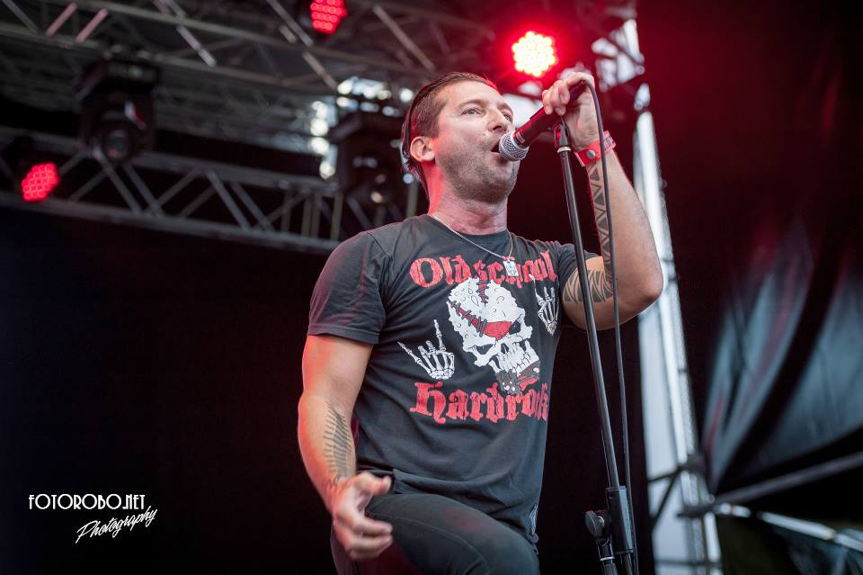 Jarda v akci